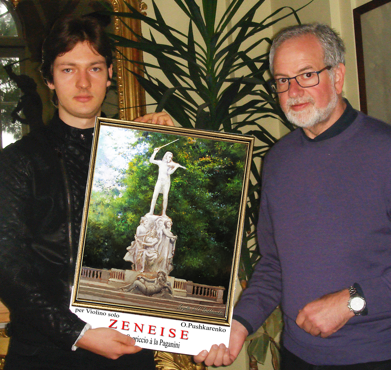 Mario Trabucco e il suo allievo Oleksandr Pushkarenko con il progetto del monumento a Niccolò Paganini.